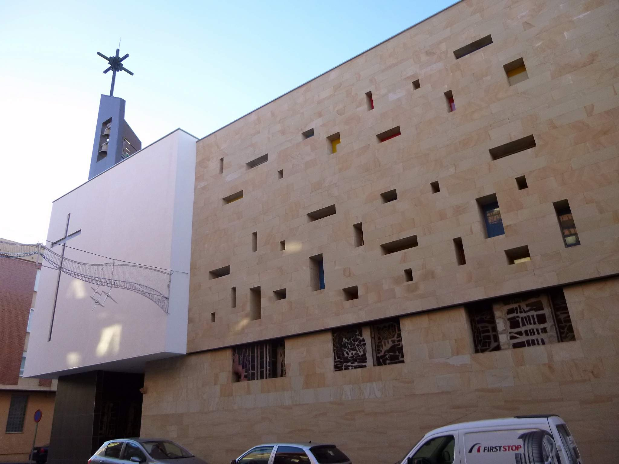 Iglesia de San Martín de Tours, en Albelda de Iregua (inaugurada en 2012)